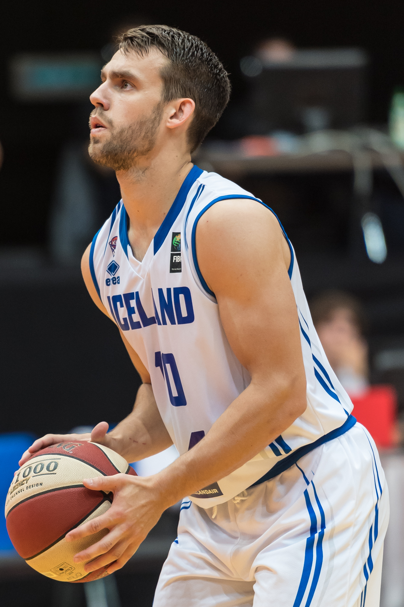 ÖBV Vier-Nationen-Turnier vom 12.-14. August 2016 in Schwechat - Island vs Slowenien. Bild zeigt Aegir Thor Steinarsson (ISL).